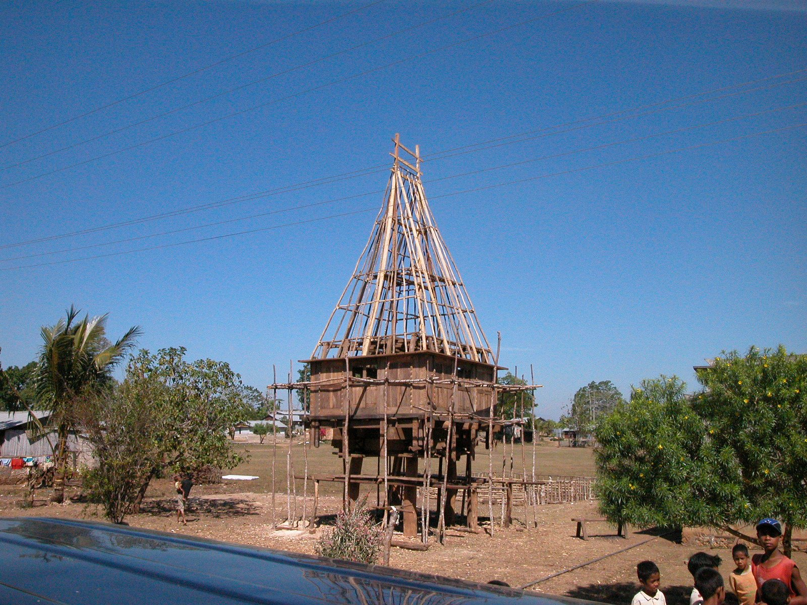 Heiliges Haus in der Gemeinde Lautém